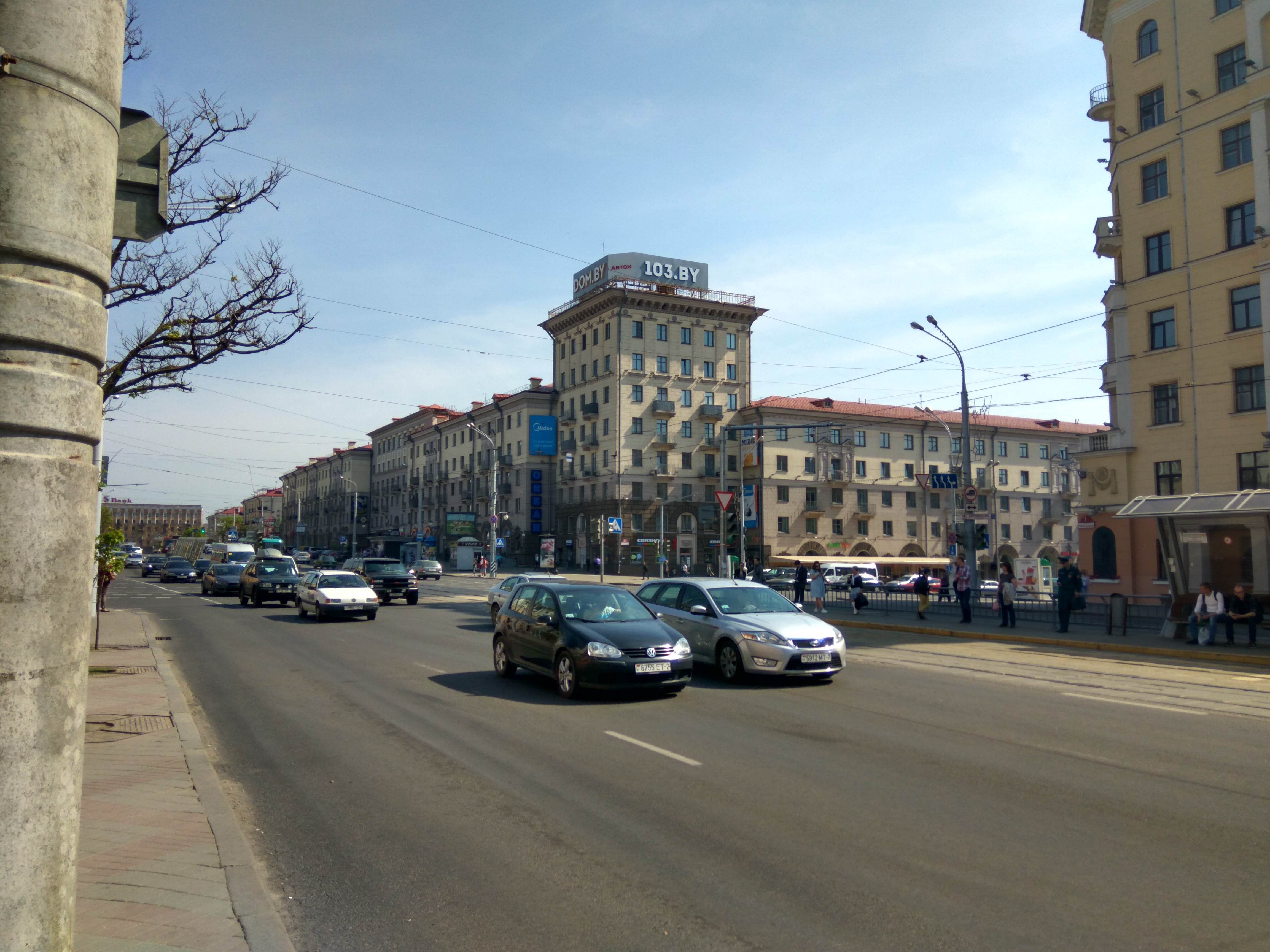 Мінск. Праспект Машэрава / праспект Незалежнасці